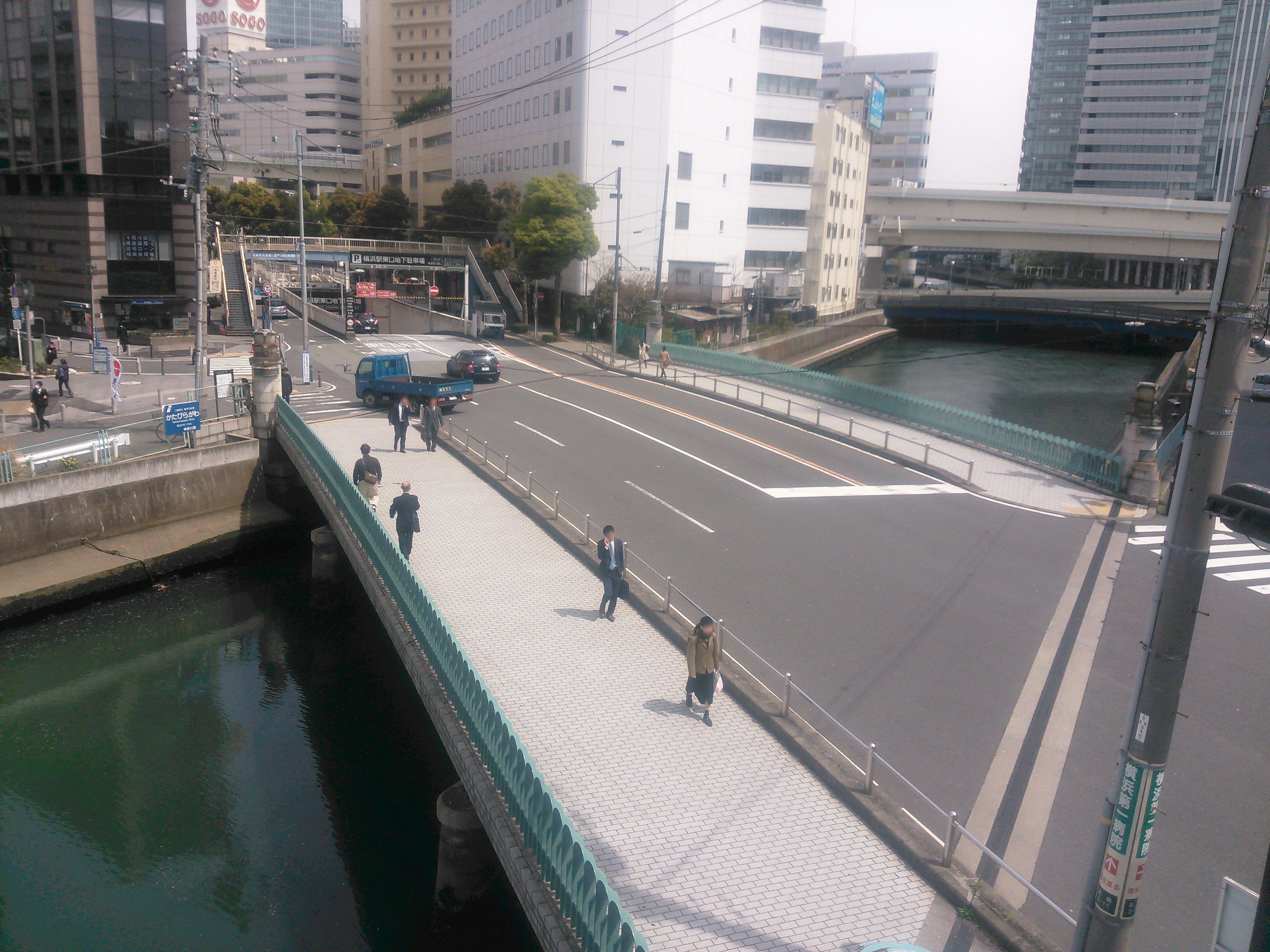 帷子川に架かる万里橋。横浜市西区高島2丁目。「万里歩道橋」より下流（東）の方向を見る。